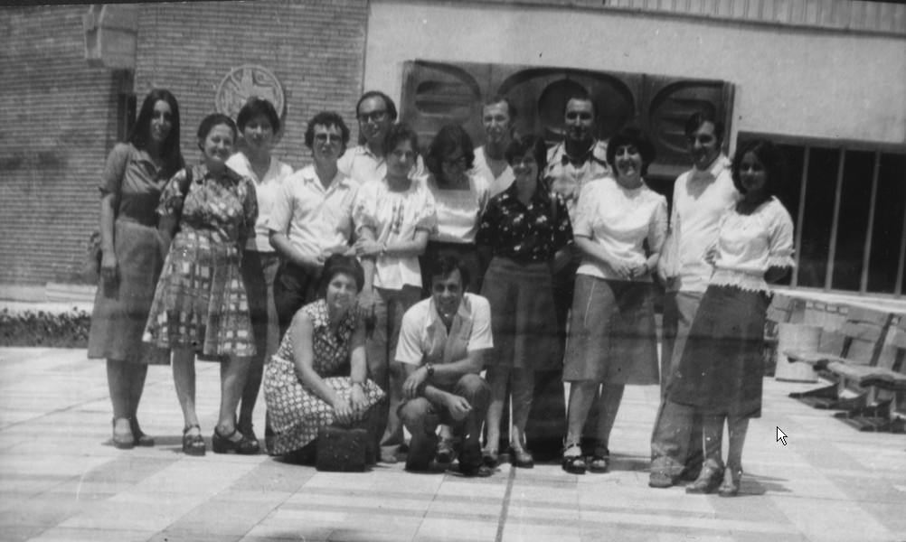 Спас Николов (вторият отдясно) с група свои студенти от Великотърновския университет, специалност „Английска филология“, випуск 1977 г.